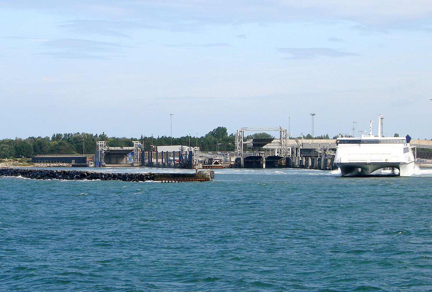 Odden Færgehavn, Sjællands Odde, Denmark